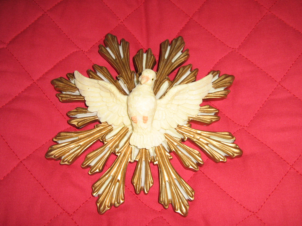 Pomba do Divino Espírito Santo